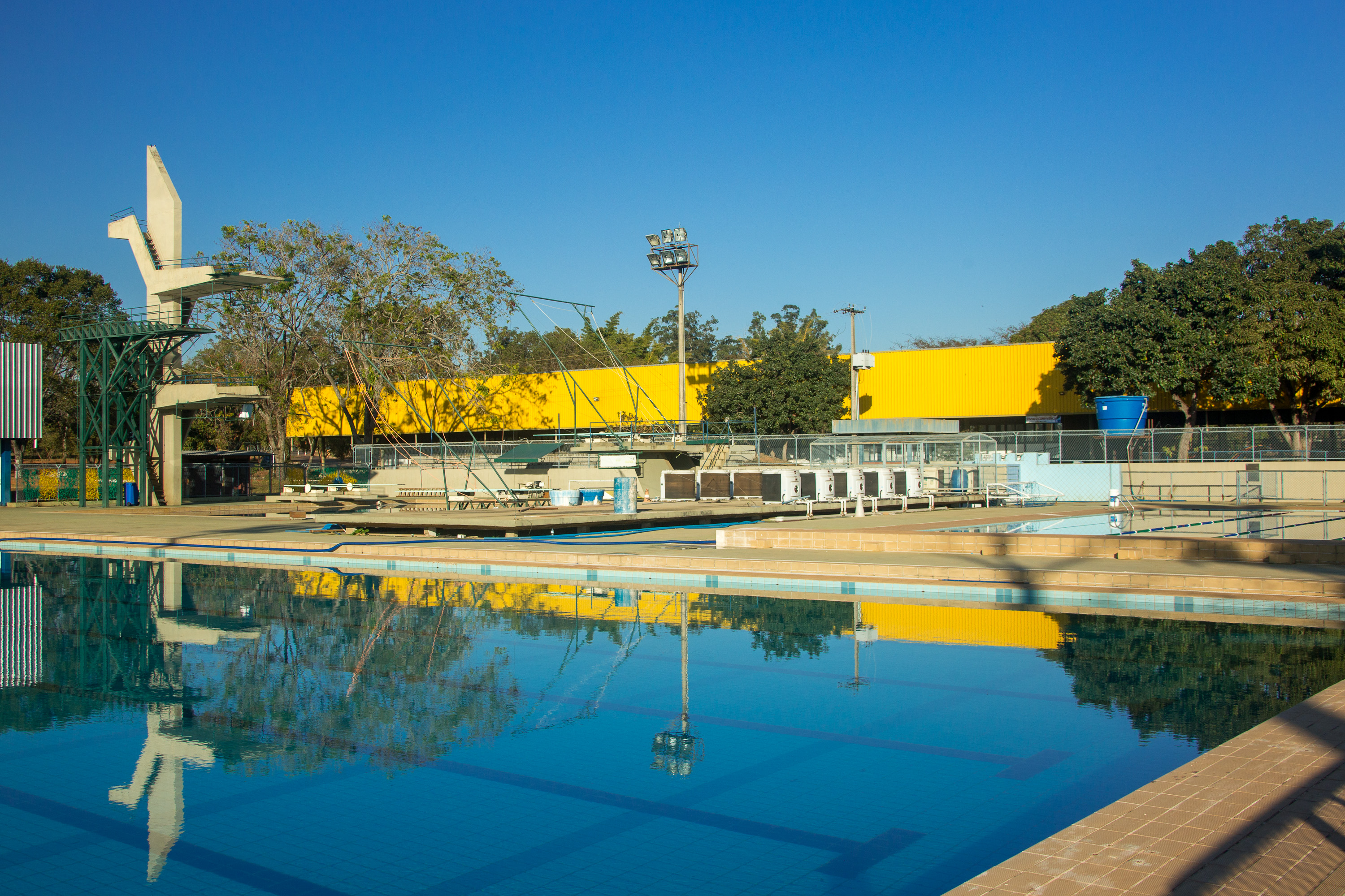 Centro de Excelência em Saltos Ornamentais, localizado no Centro Olímpico da Universidade de Brasília. Foto: Luis Gustavo Prado/Secom UnB.